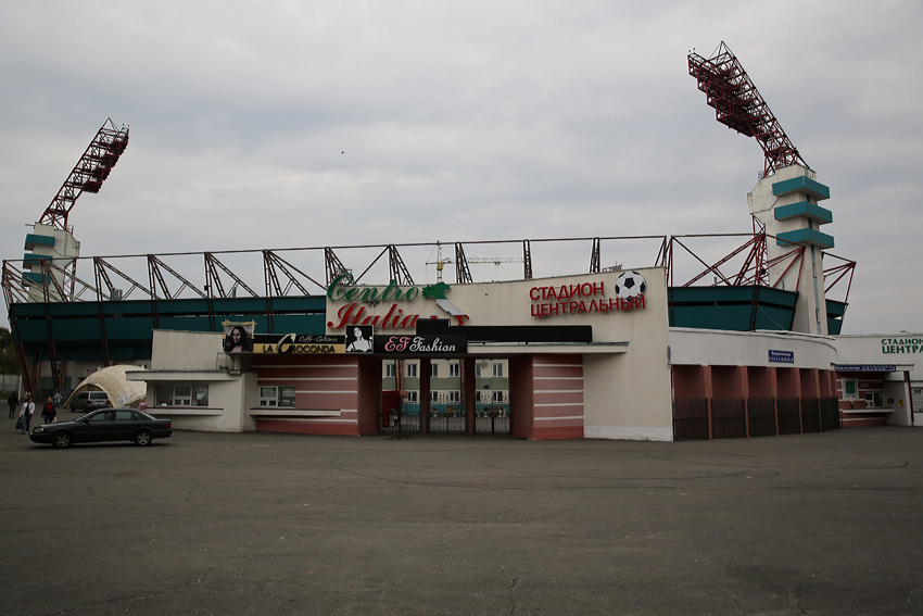 Гомель. Стадыён Цэнтральны